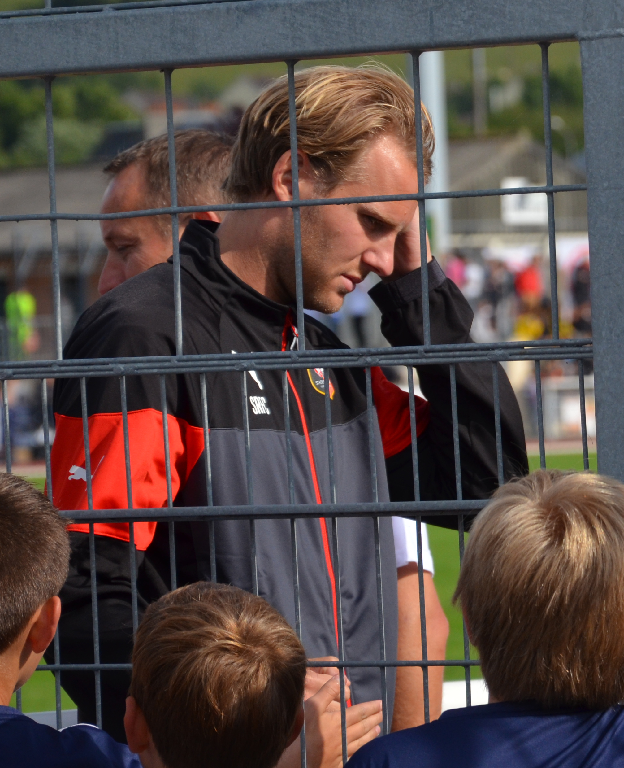 Photographie prise à l'occasion de la rencontre amicale opposant le Stade Malherbe de Caen au Stade rennais, le 9 juillet 2014 au stade Pierre-Comte de Vire. Ici, Ola Toivonen.